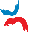 Wikimania logo